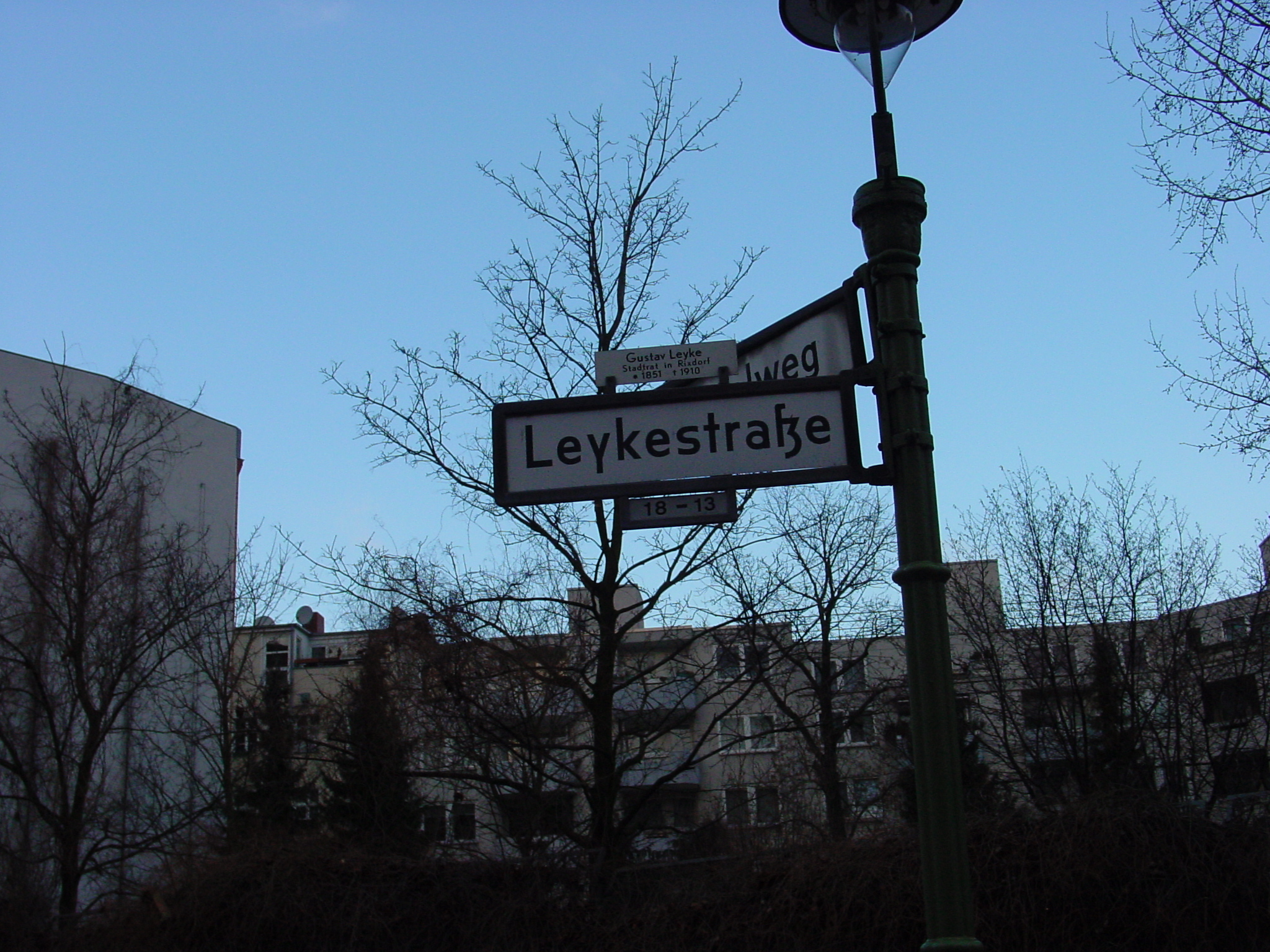 Straßenschild Leykestraße, Berlin-Neukölln